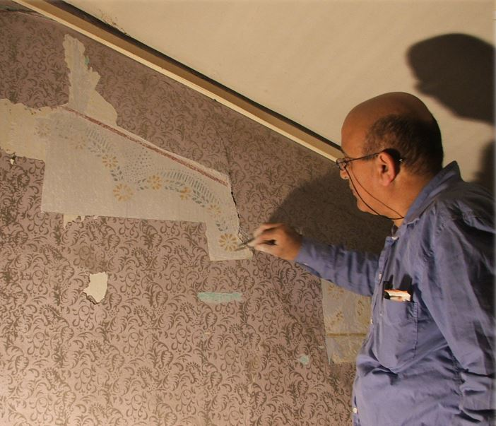 שי פרקש בעבודת חשיפה של שכבות ציורי קיר היסטוריים במושבה האמריקאית ביפו